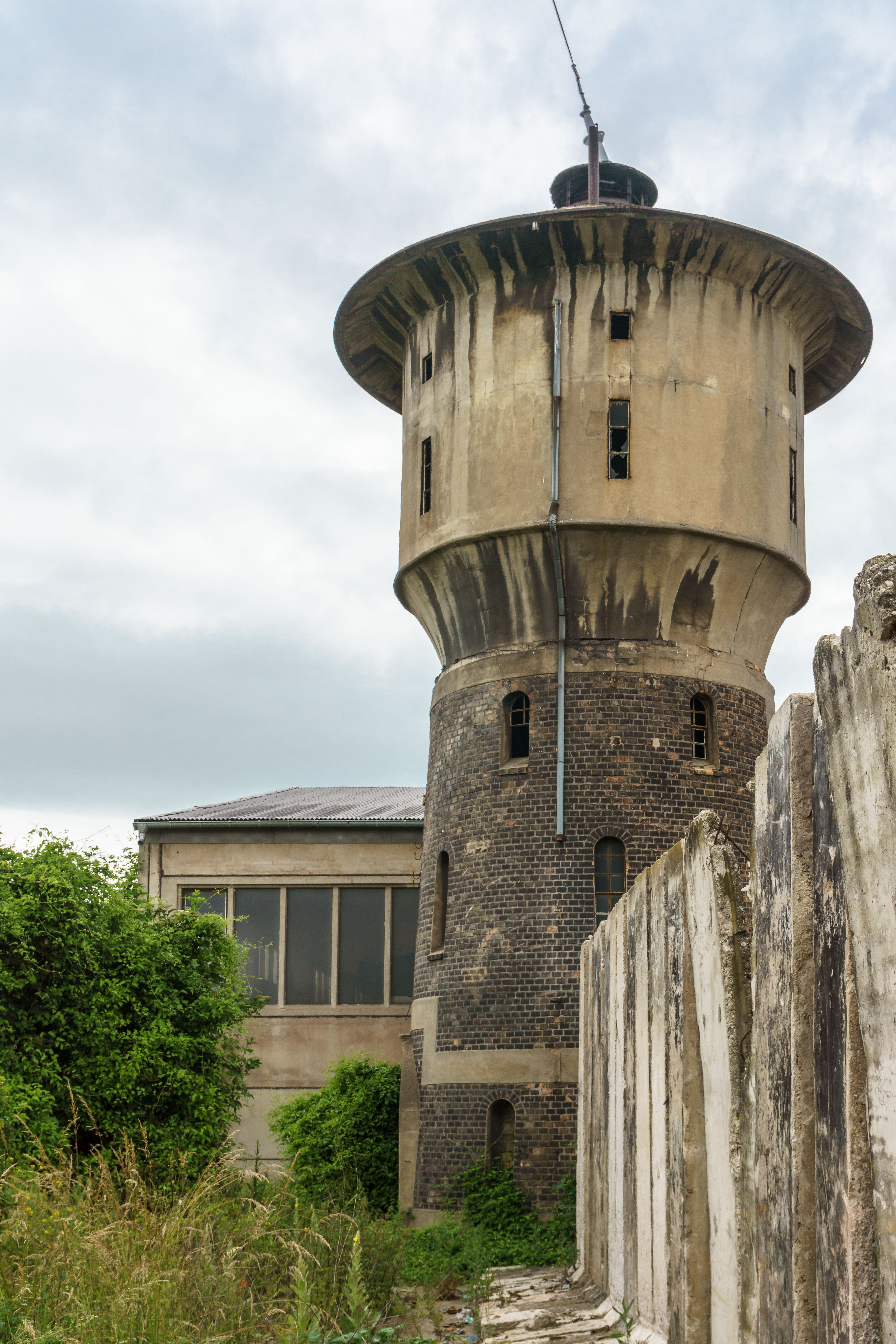 Wasserturm nördlich des Bahnhofs in Querfurt